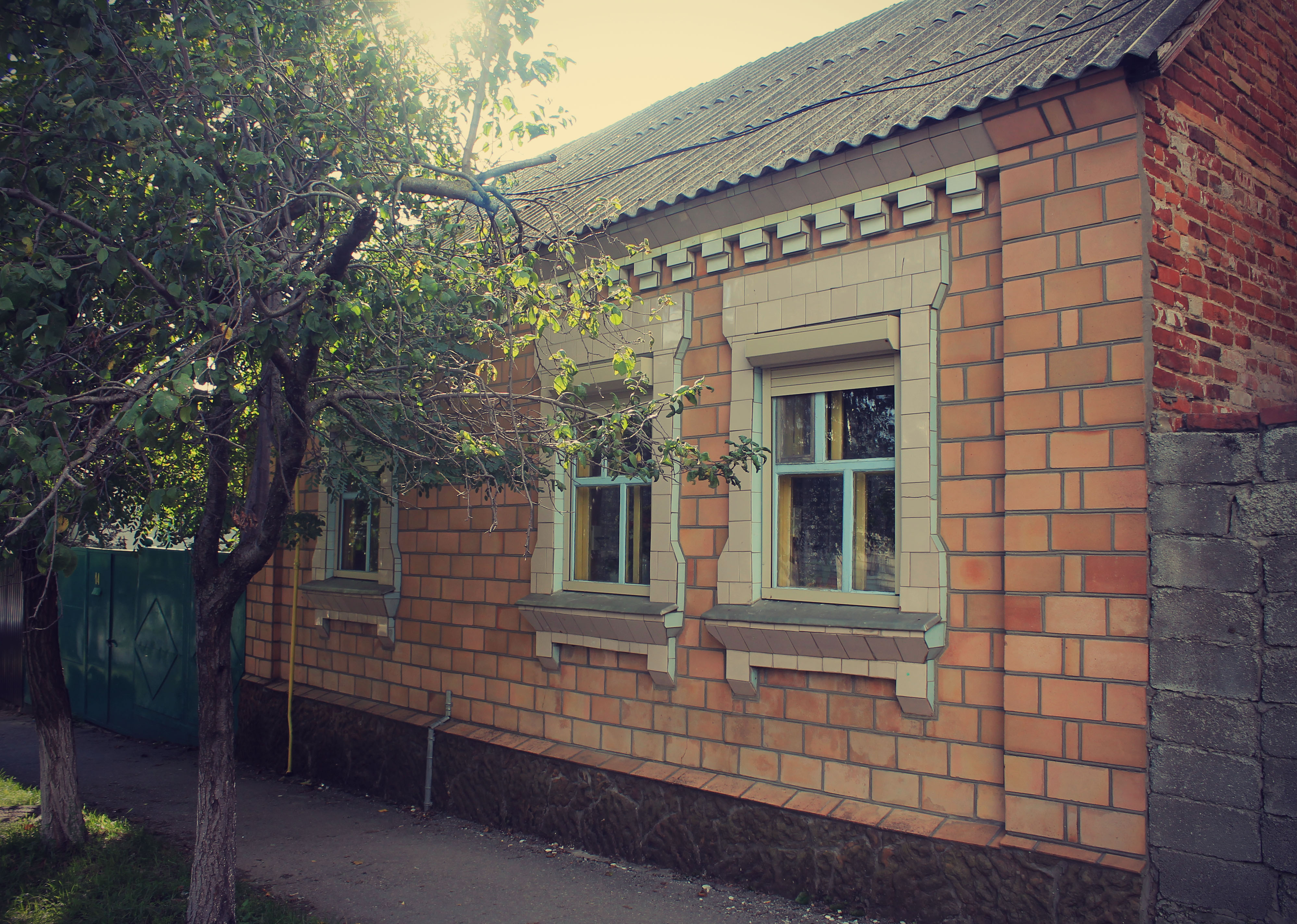 Дом по адресу Новороссийск, Кирова улица, 14